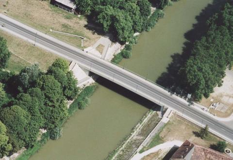 A Szent Erzsébet híd Esztergomban